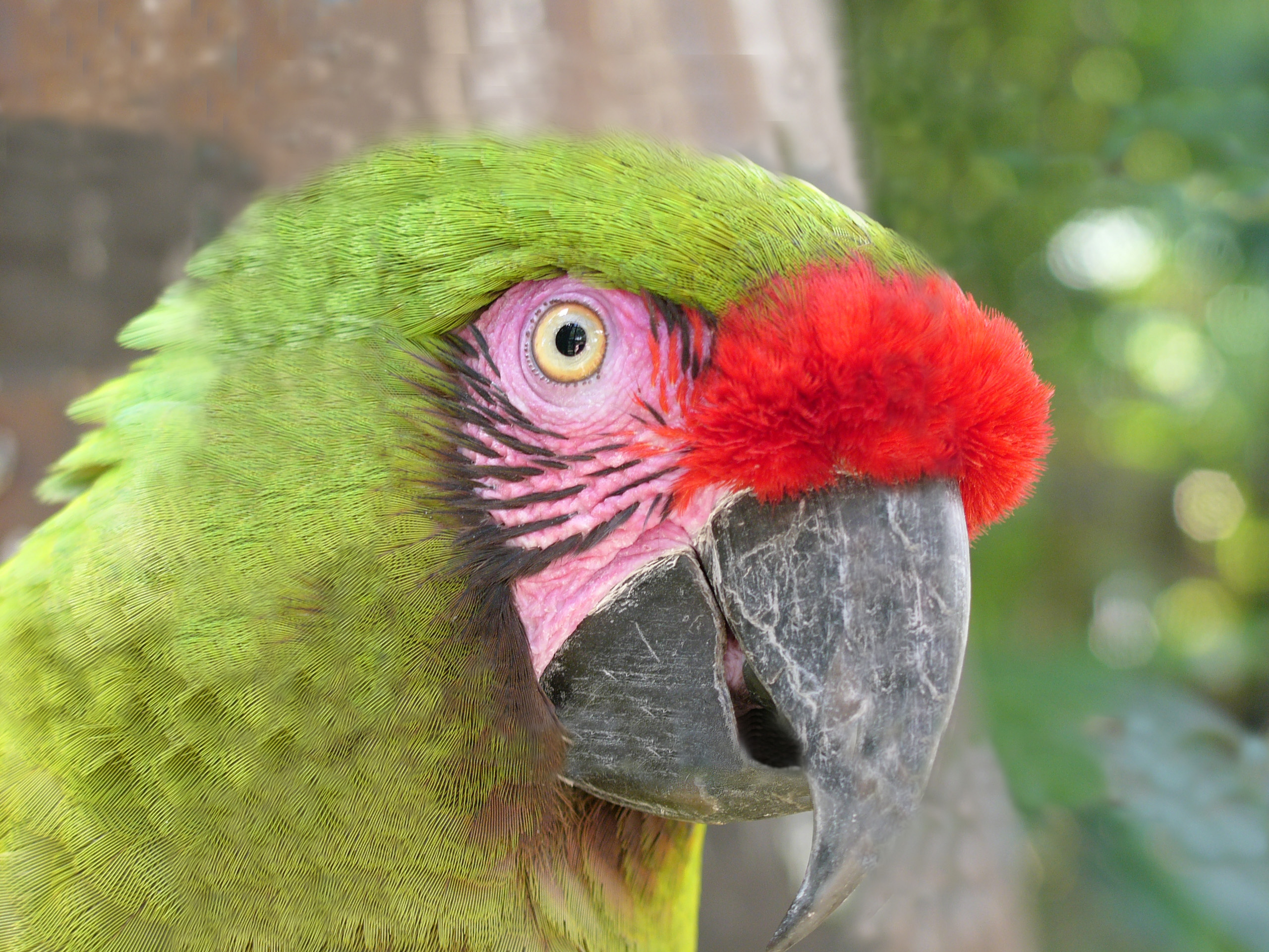 Ara ambigua in Botanical Garden Madeira